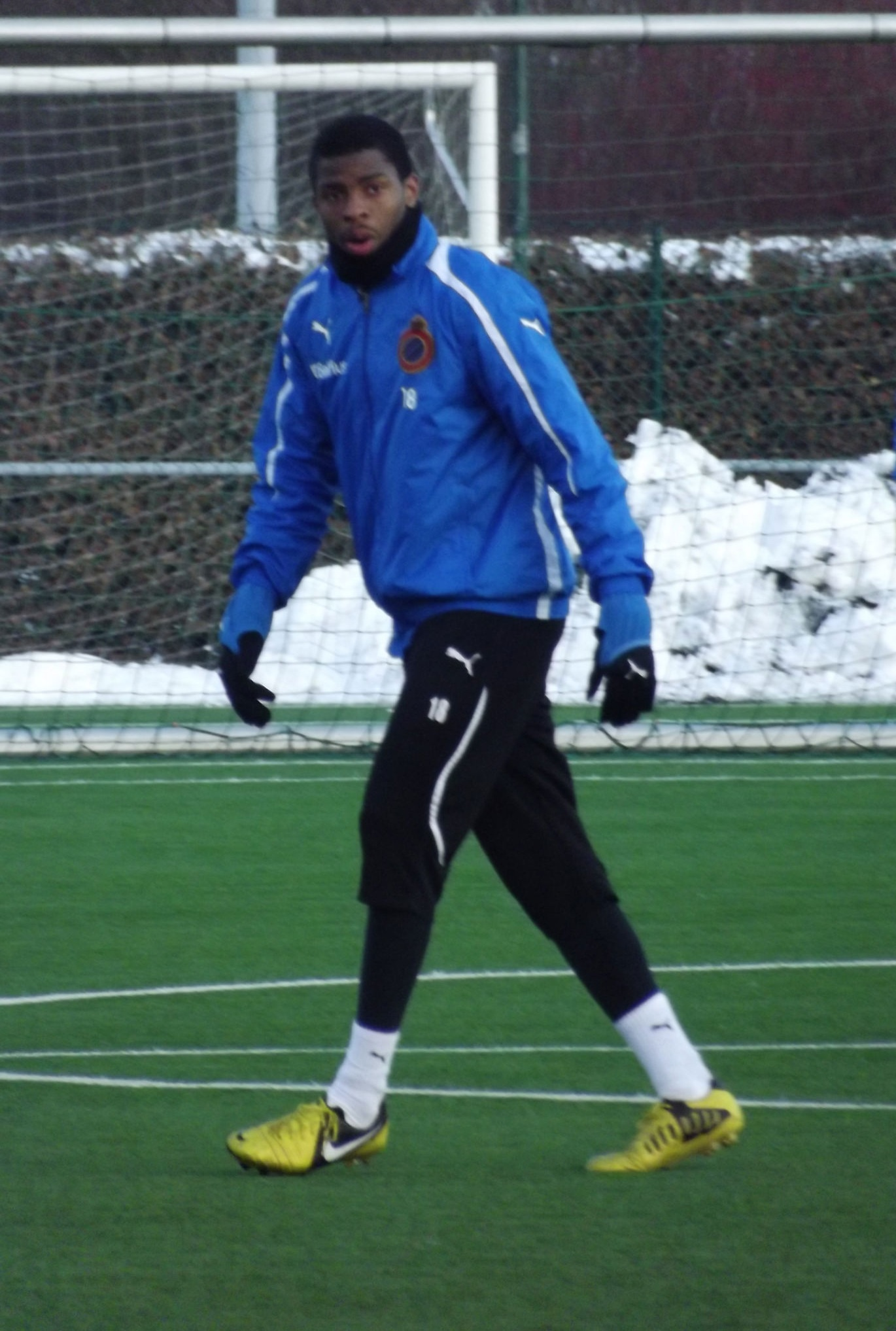 Ryan Donk tijdens een veldtraining van Club Brugge op 16 januari 2013